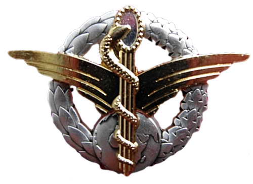 Insigne militaire de l'armée de l'air française que portent les infirmières et infirmiers convoyeurs de l'air d'origine MITHA SSA